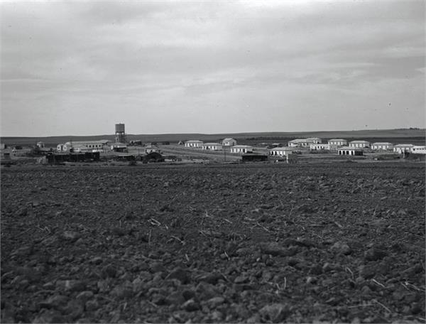 בארות יצחק - מראה כללי